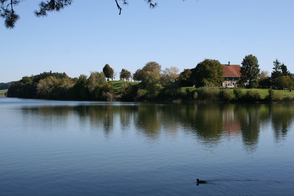 Lac de Bret pres de Chexbres.(Vaud) Suisse